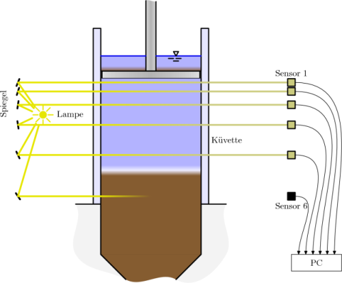 Funktionsschema des Messgeräts SCHLUMOSED